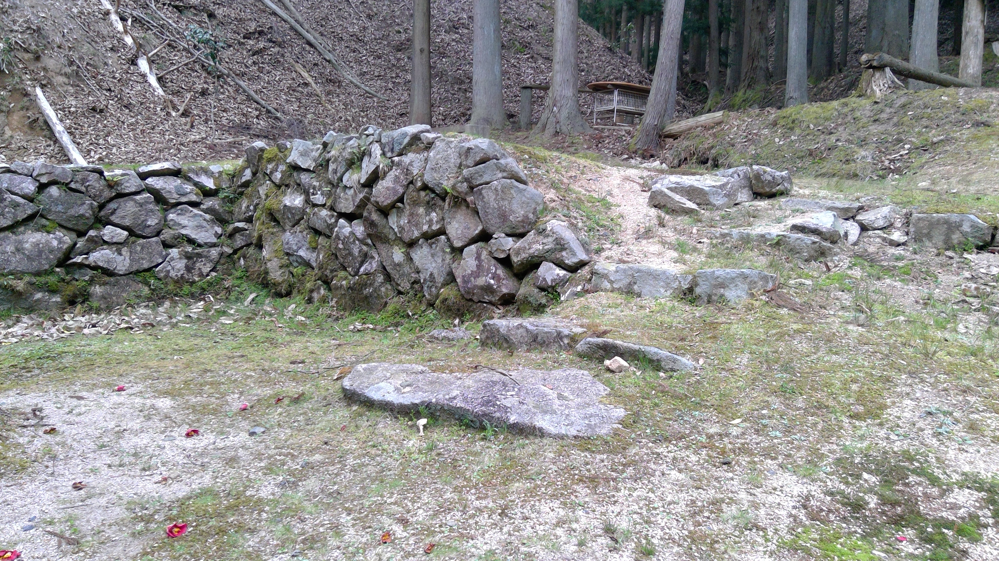 「千年椿」の愛称で親しまれる京都府与謝野町滝にあるヤブツバキの巨木の周辺に残る、かつての集落の石垣